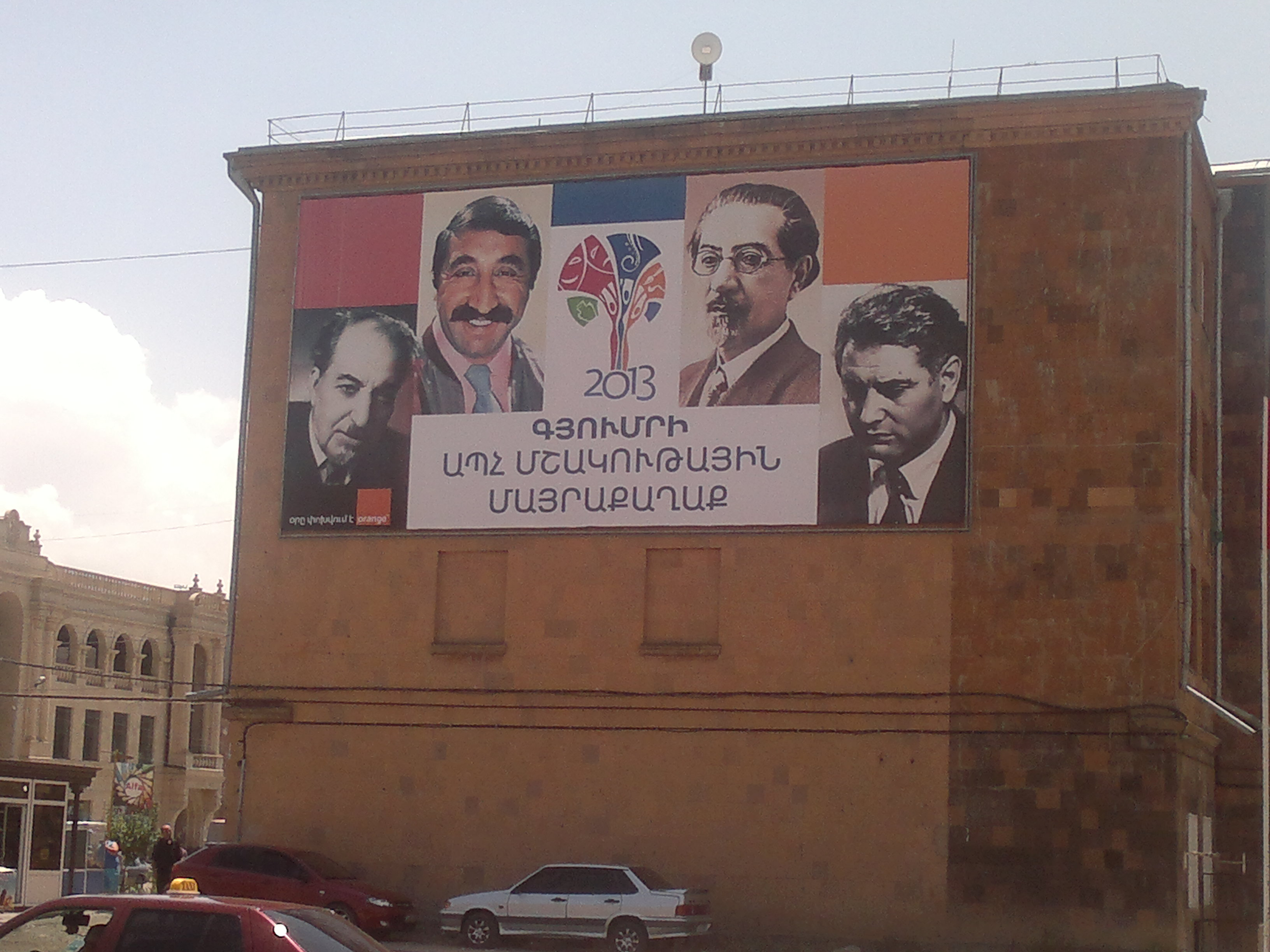 Գյումրին 2013 թ.-ին հռչակվեց որպես ԱՊՀ մշակույթային մայրաքաղաք